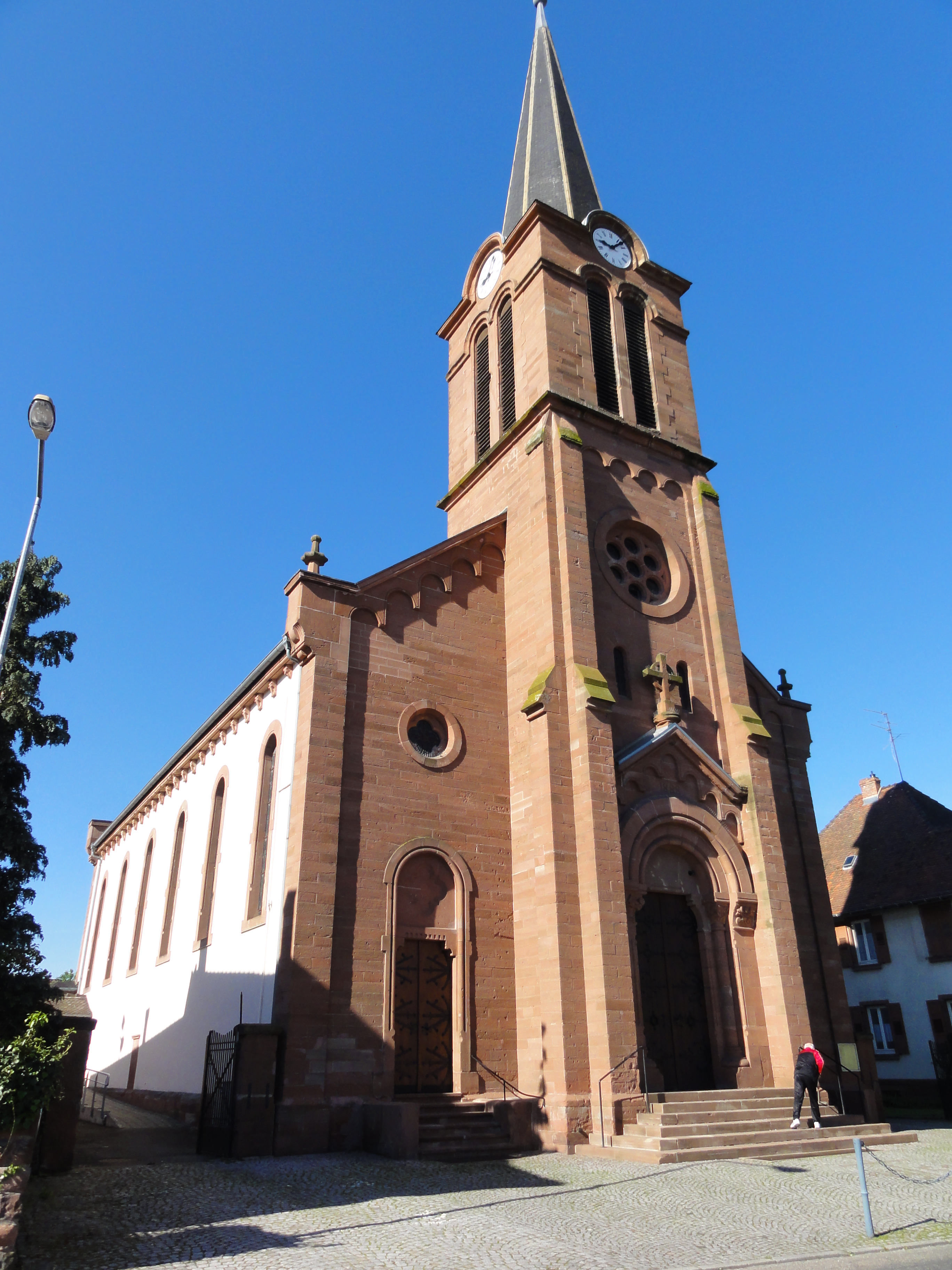 Alsace, Bas-Rhin, Schweighouse-sur-Moder, Église Saint-Jacques-le-Majeur (1888), rue du Général-de-Gaulle.